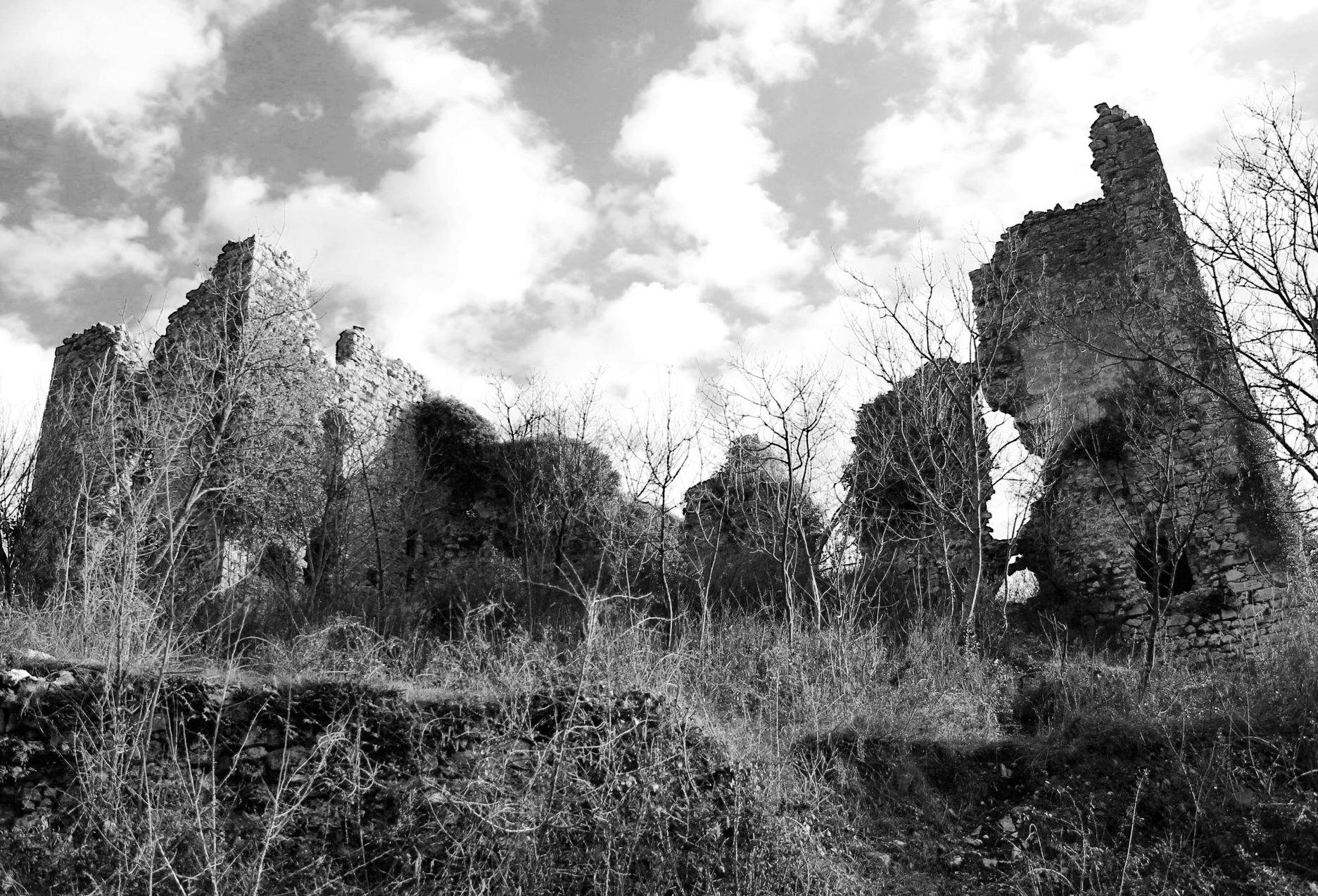 Ruderi dell'antico edificio storico - A.Luciano